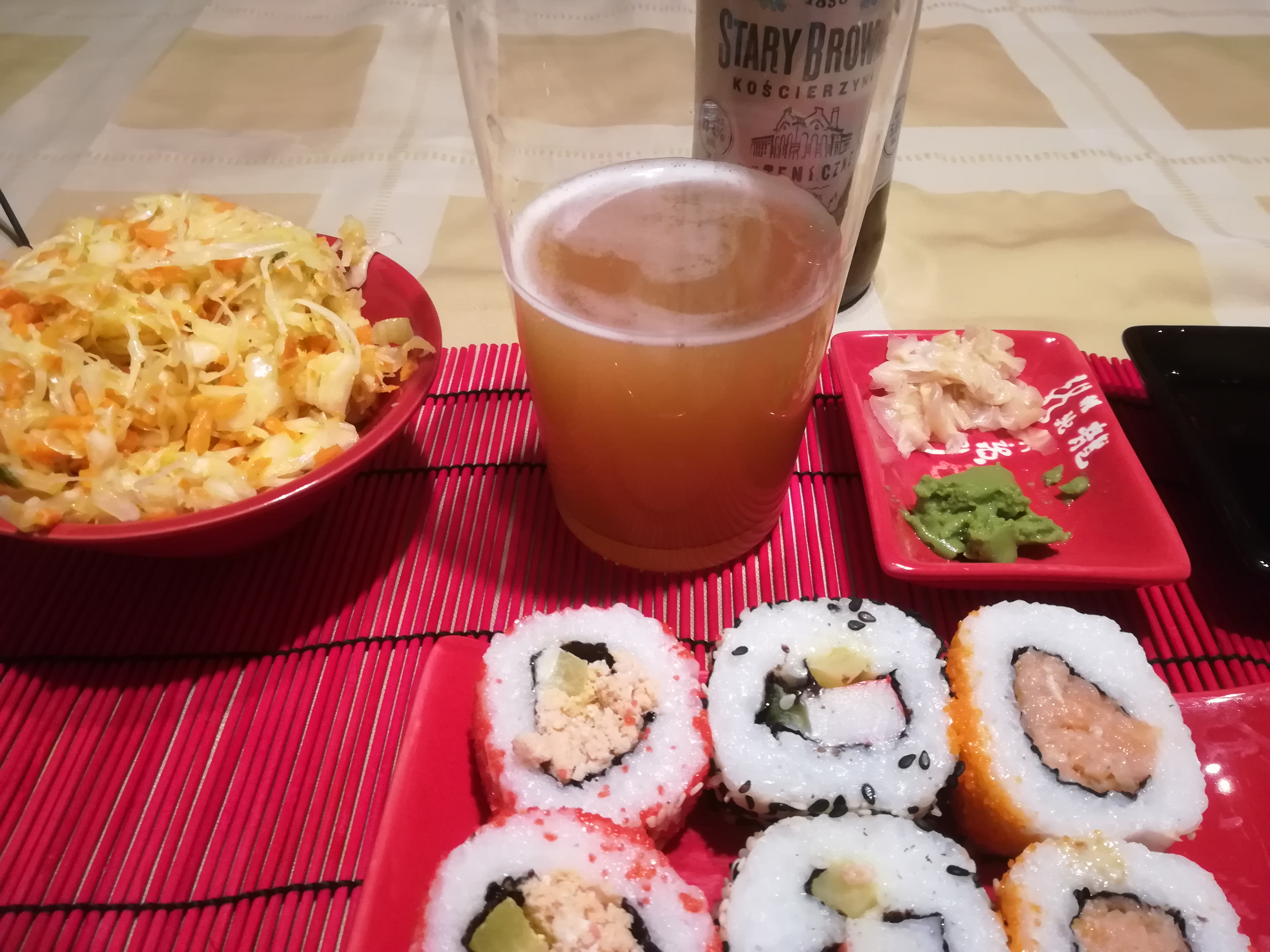 Sushi z piwem w Poznaniu. Browar Kościerzyna.